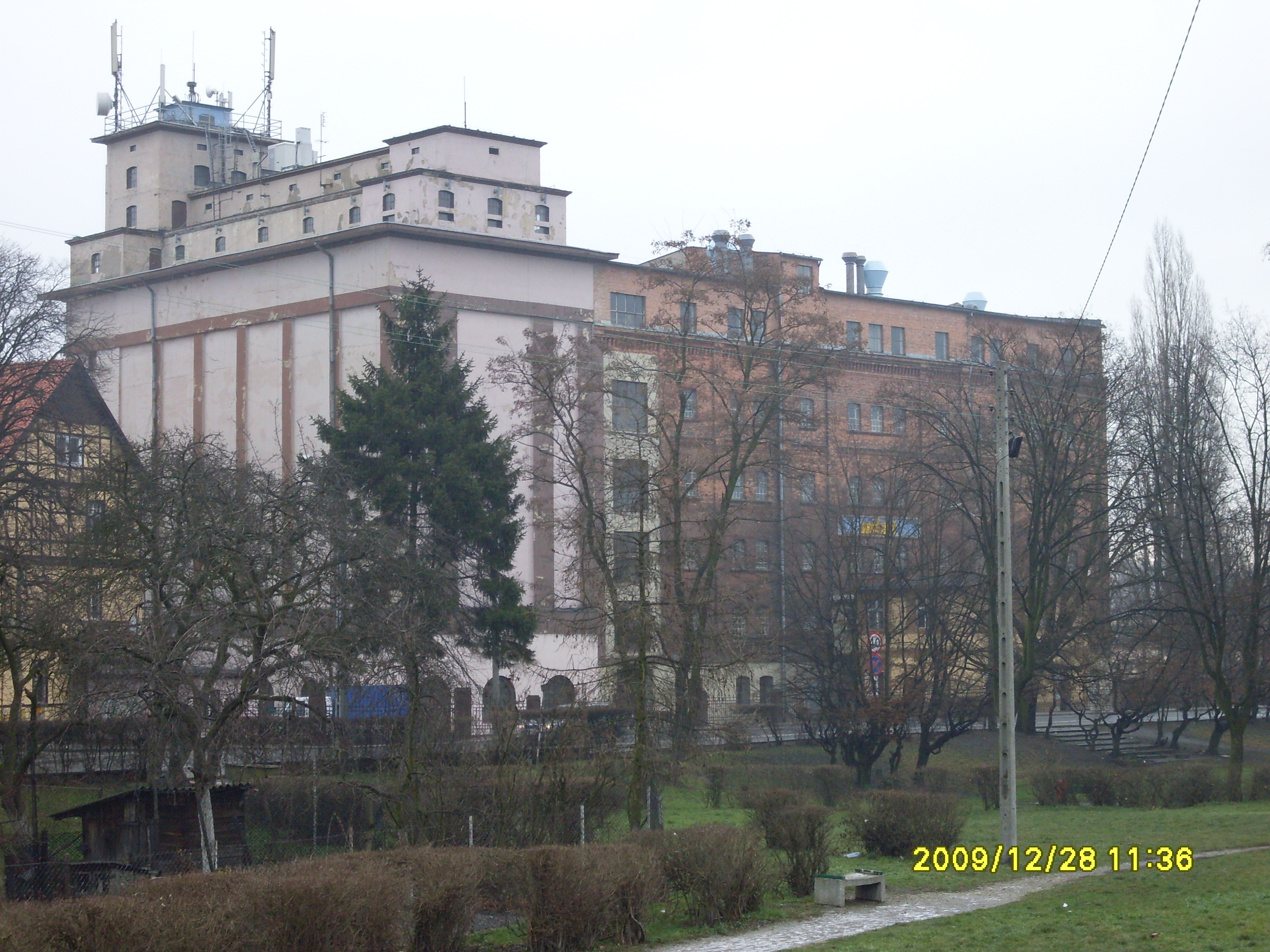 mlyn